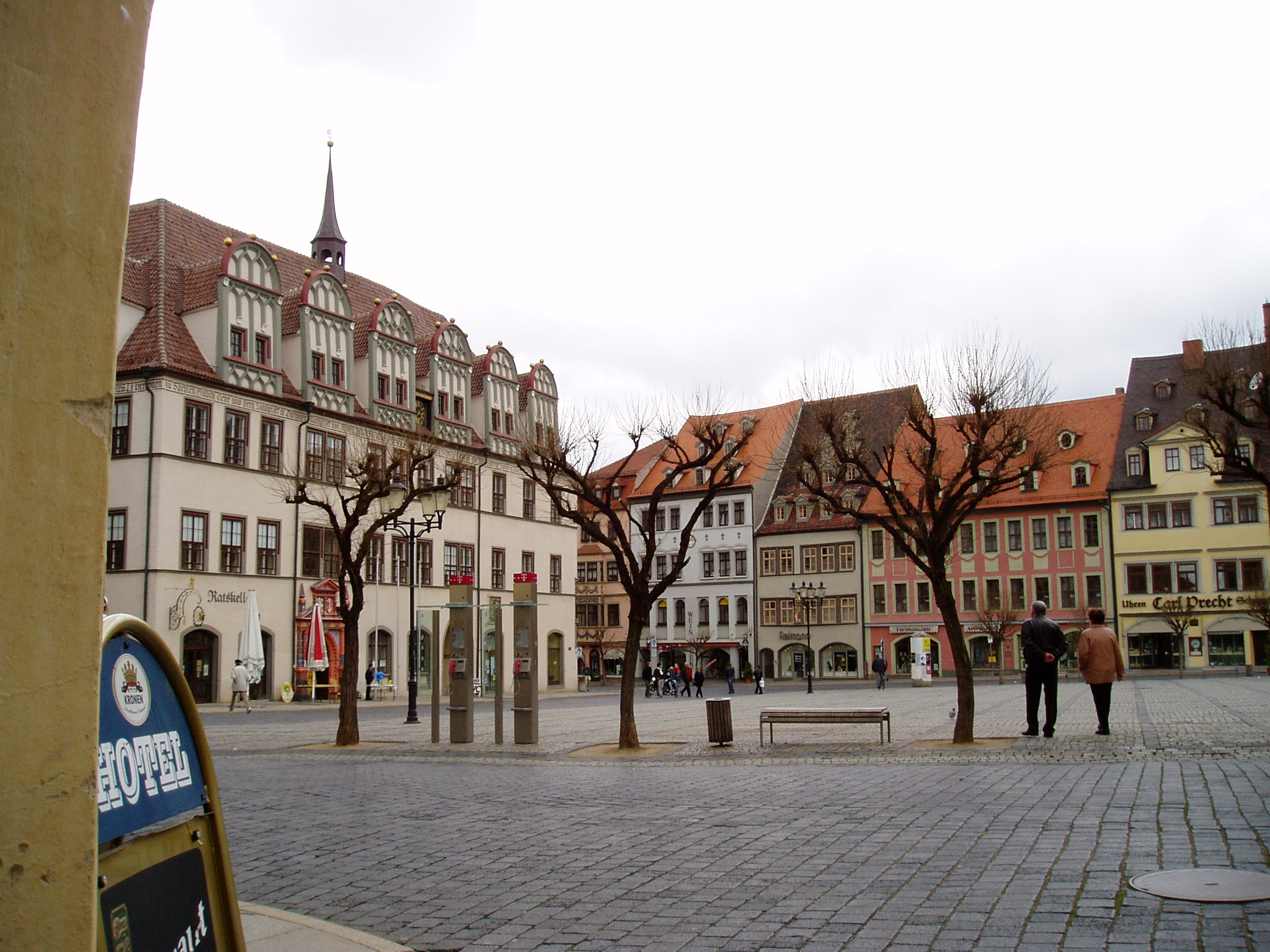 Naumburg, Marktplatz